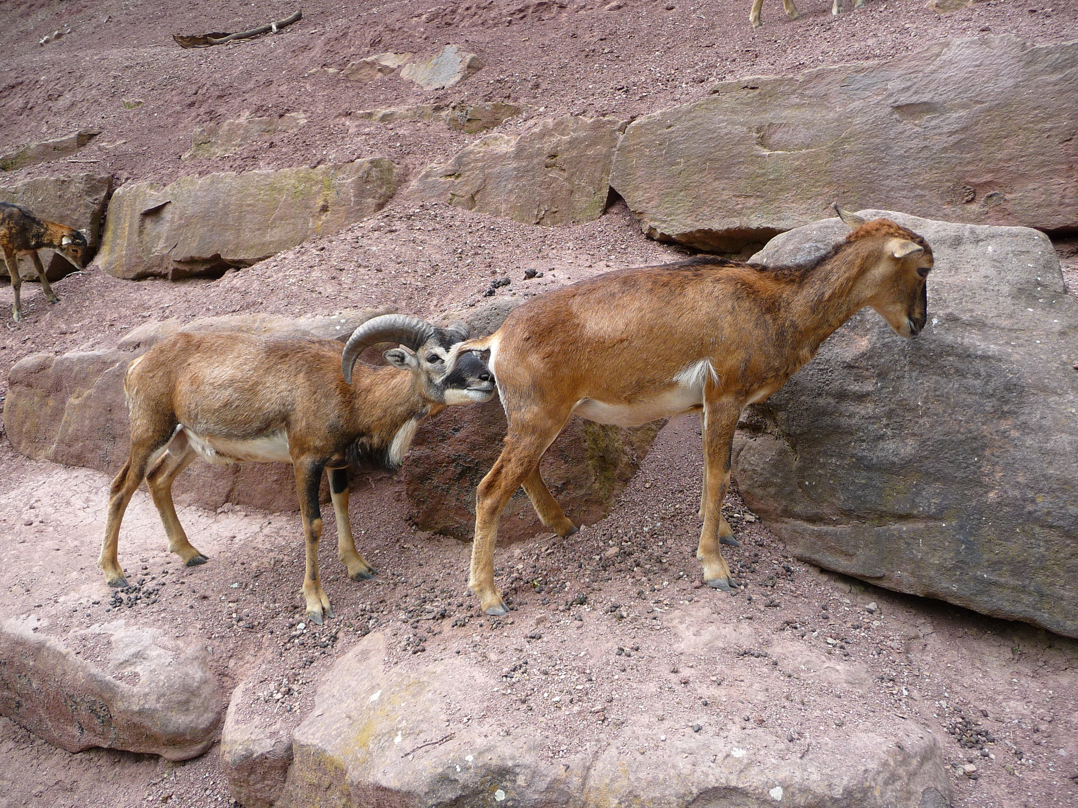 Europäisches Mufflon (Ovis orientalis musimon) prüft Aufnahmebereitschaft eines Weibchens im Wildpark Tripsdrill (Baden-Württemberg, Deutschland)